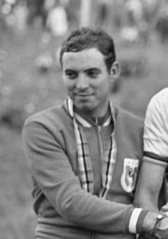 WK Wielrennen te Heerlen: Claude Gayot